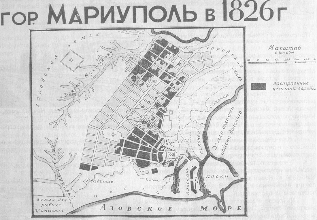 Mariupol old map map